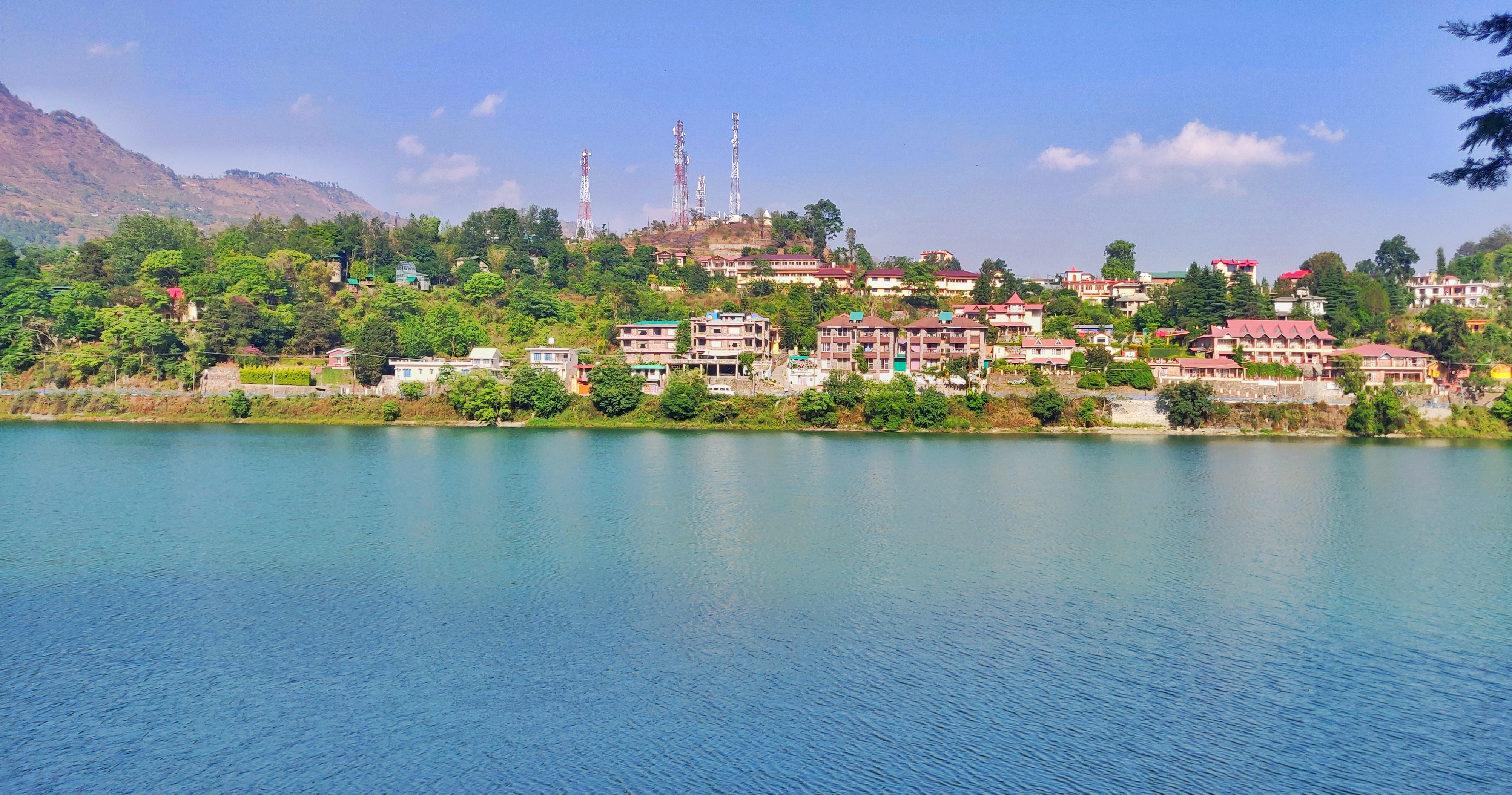 Bhimtal lake view